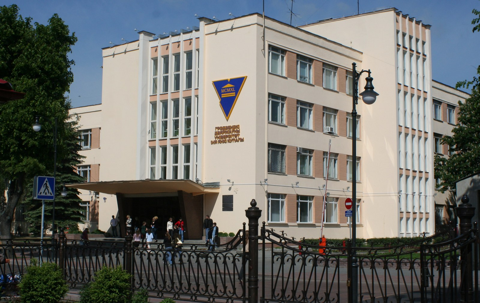 Главный корпус ГрГУ им. Янки Купалы